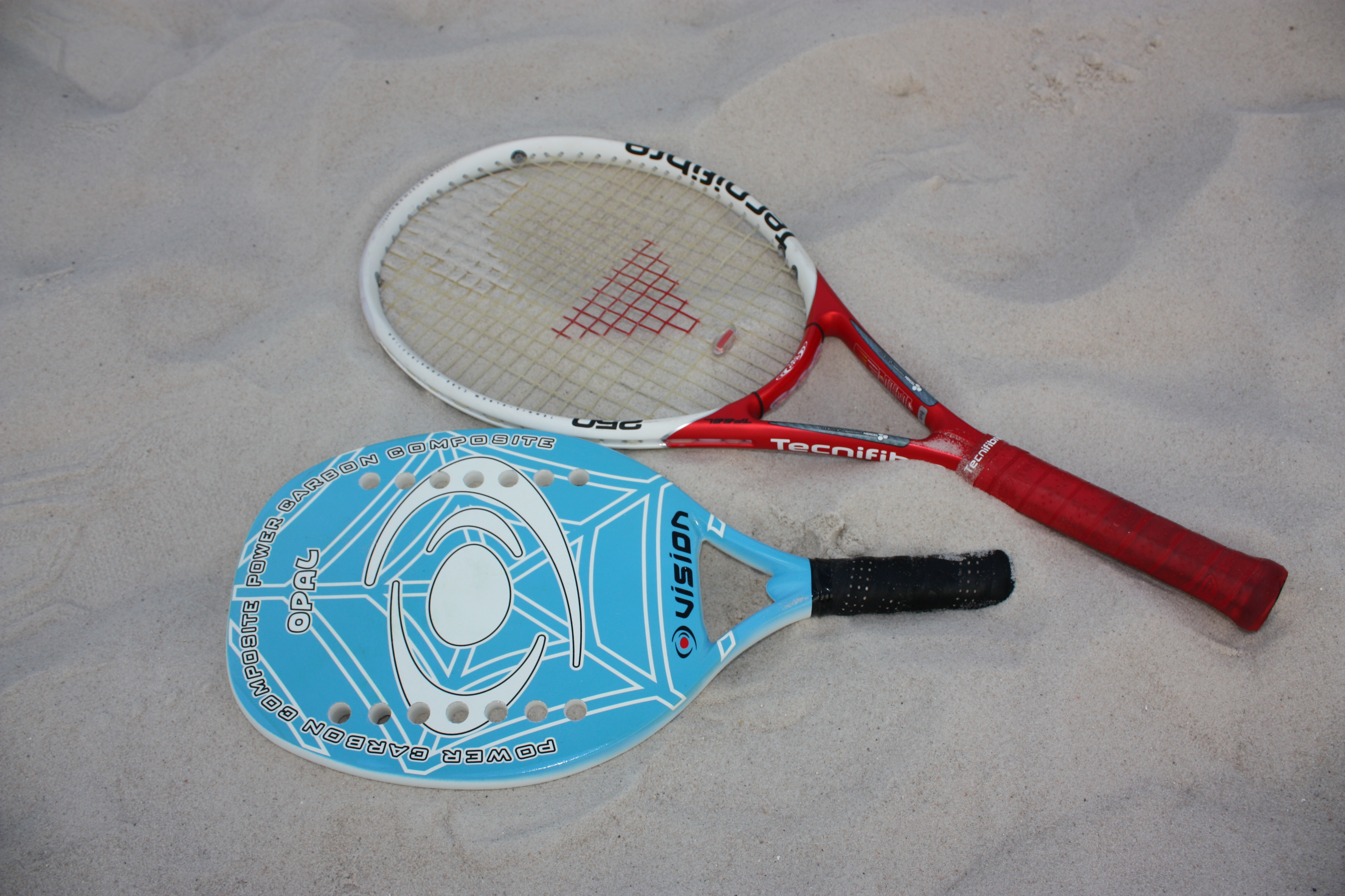 /Users/giannik/Desktop/Tennis + beach rossa.jpg